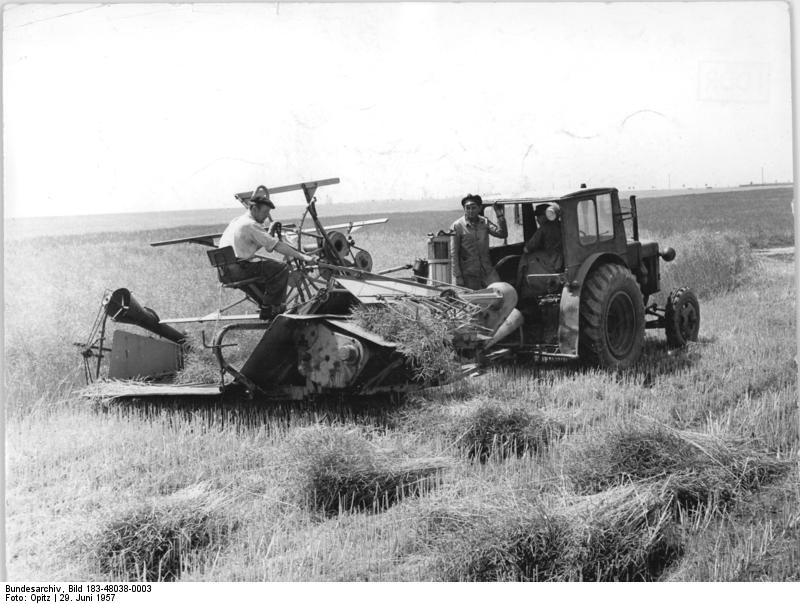 Rückmarsdorf, Getreideernte mit Mähbinder Zentralbild Opitz Weiß-Qu 29.6.1957 Beginn der Ernte im Bezirk Leipzig UBz: Auch die MTS Wiesenau begann mit den Erntearbeiten. Hier die erste Mahd auf dem 10 ha großen Rapsfeld der LPG " 8. Mai " in Freiroda